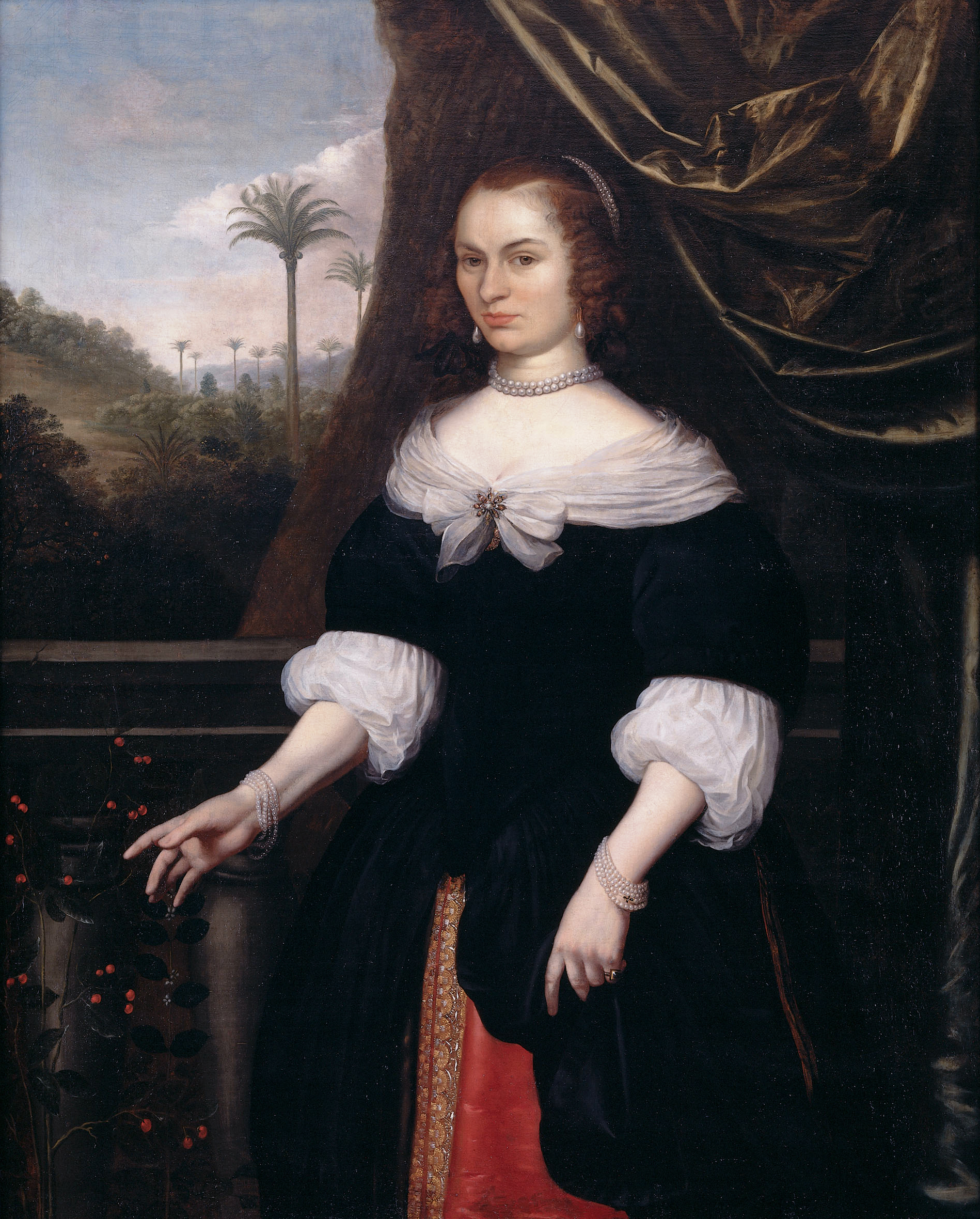 Pendant of File:Jan Valckenburgh (1623-1667) by Daniel Vertangen.jpg